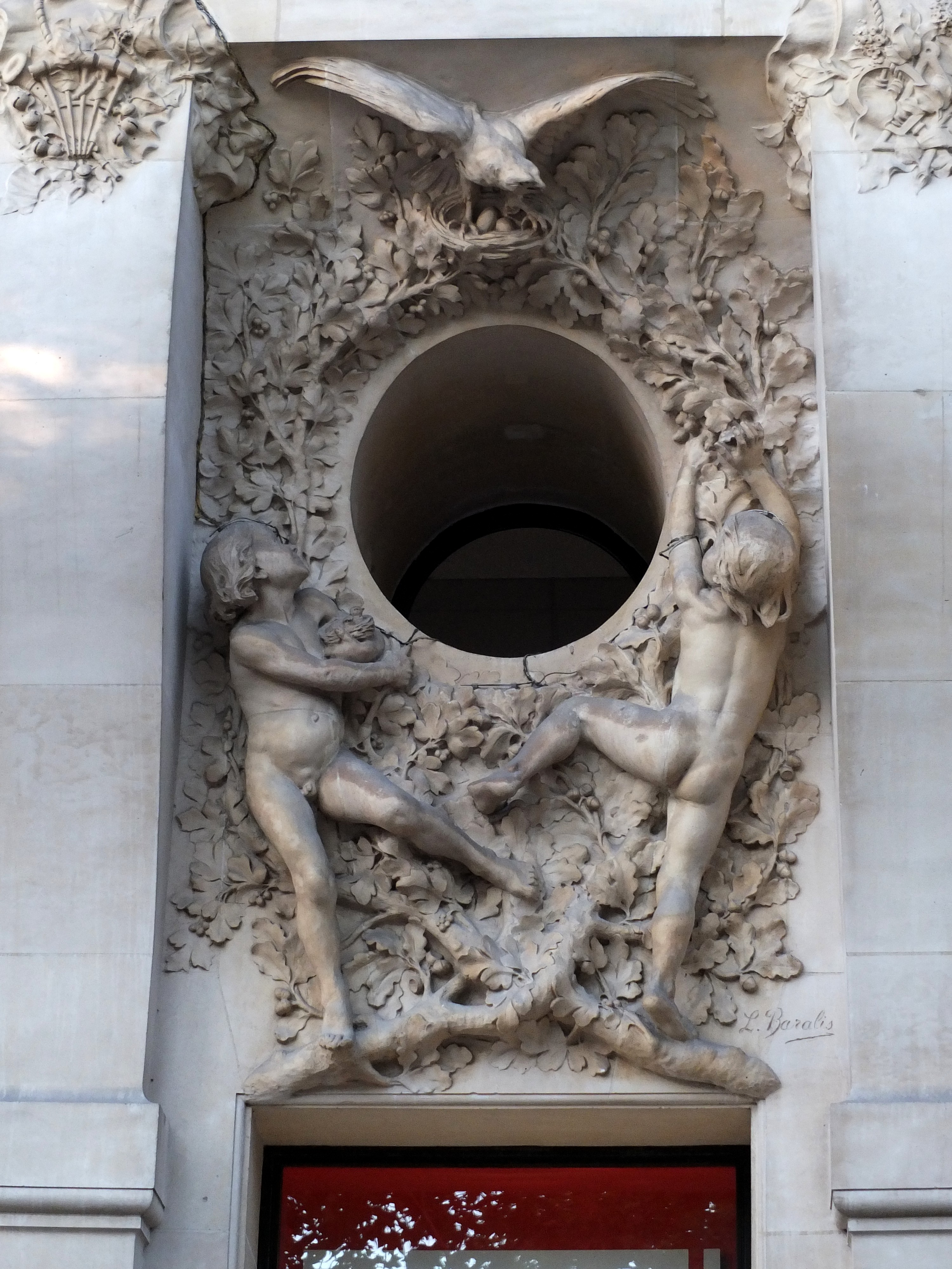 Décor sculpté par Louis Baralis (1862-1940) - Bâtiment de l'ancien hôtel Élysée-Palace au 103 avenue des Champs-Élysées (Paris, 8e arrond). Architecte Georges Chedanne (1861-1940).